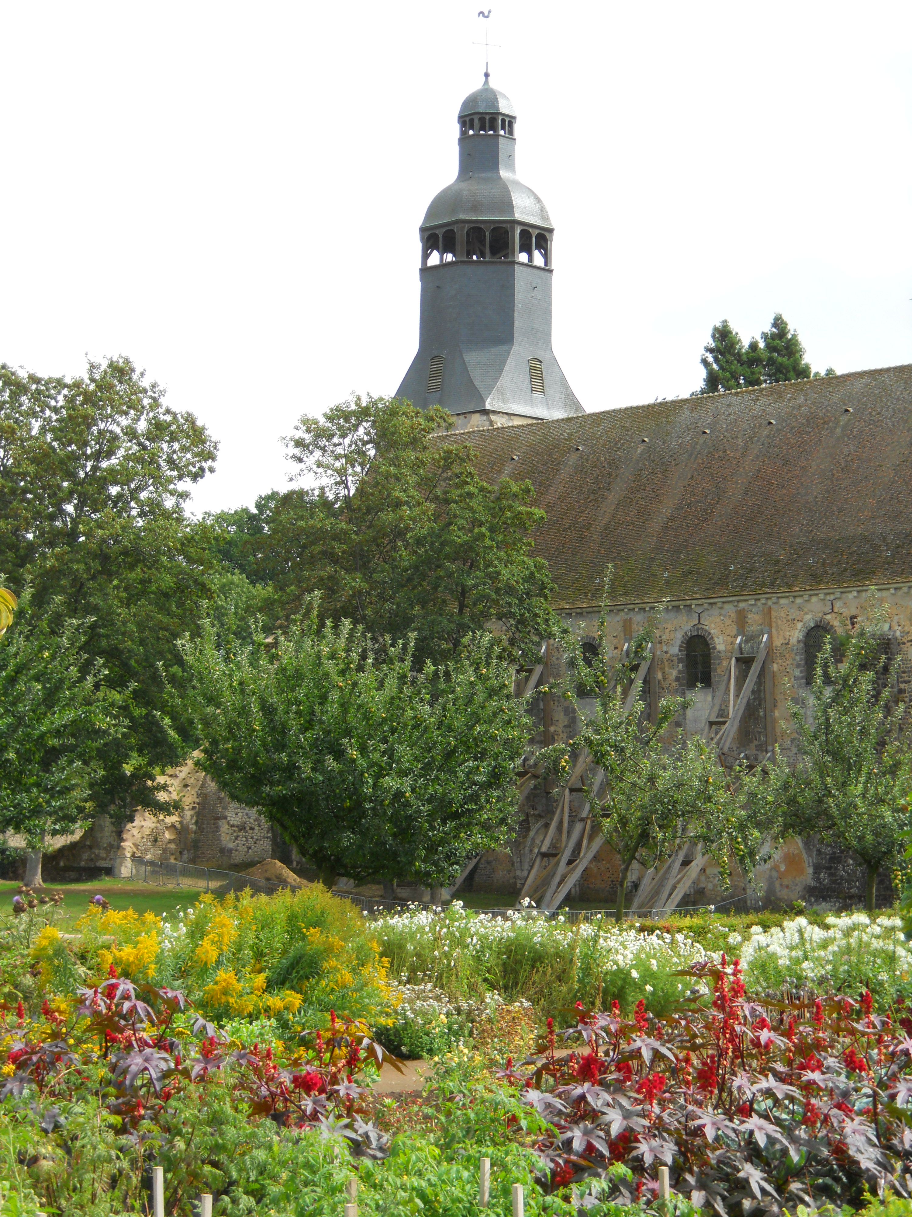 Abbaye de la Sainte-Trinité de Tiron, rue de l'Abbaye (ClasséInscrit, 19621912)